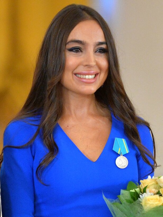 Вице-президент Фонда Гейдара Алиева, глава представительства Фонда Гейдара Алиева в Российской Федерации Лейла Алиева на церемонии награждения Медалью Пушкина